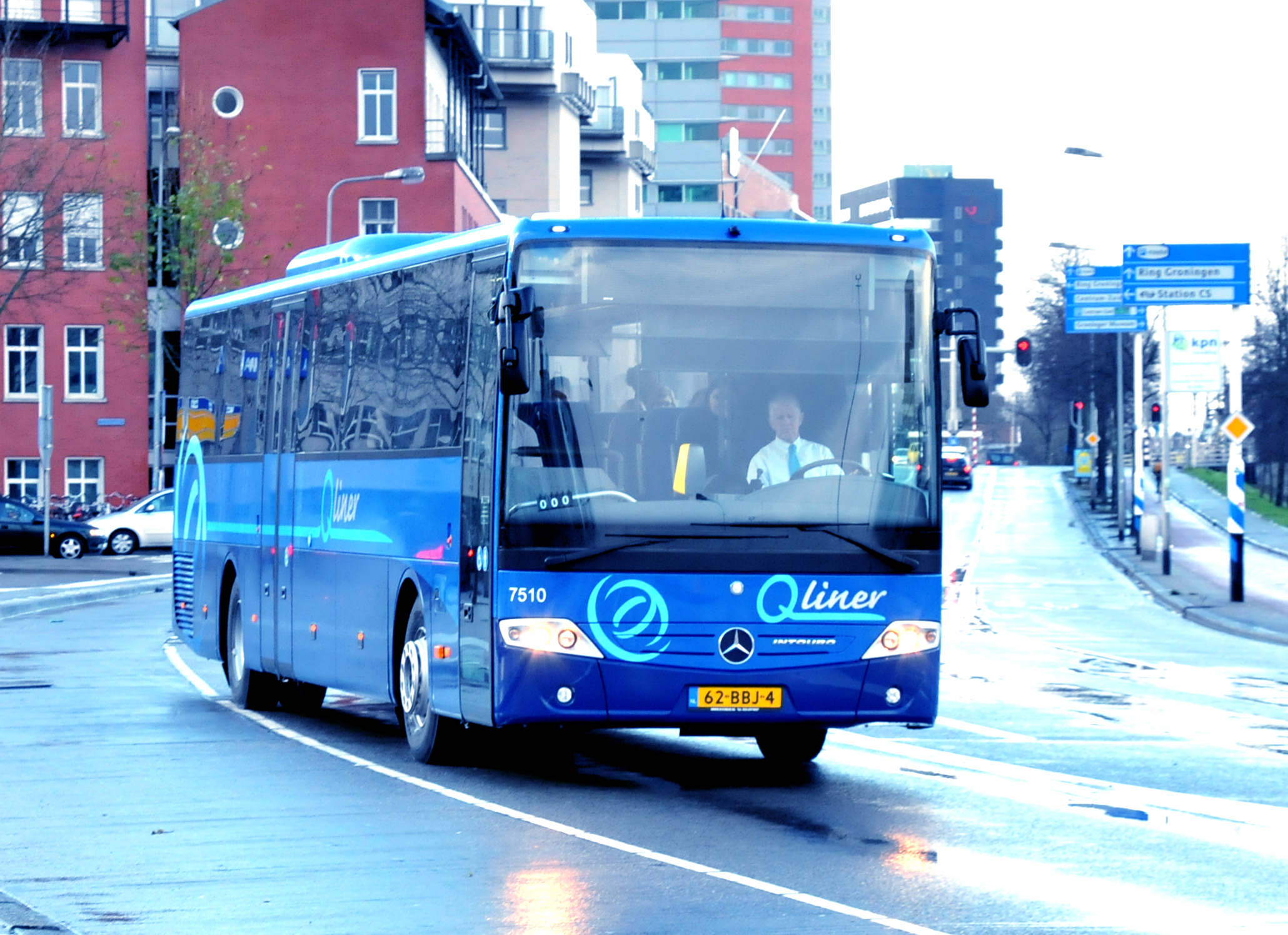 Arriva bus 7510 van het type Mercedes-Benz O633 Intouro M te Groningen-Hoofdstation.